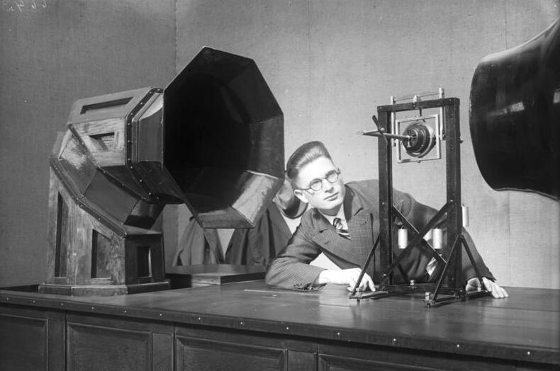 Die Eröffnung der II. Internationalen Luftfahrt -Ausstellung in den Ausstellungshallen am Kaiserdamm in Berlin. Ein Propeller-Prüfstand des Aero-Dynamischen-Institutes Aachen auf der ""LA".